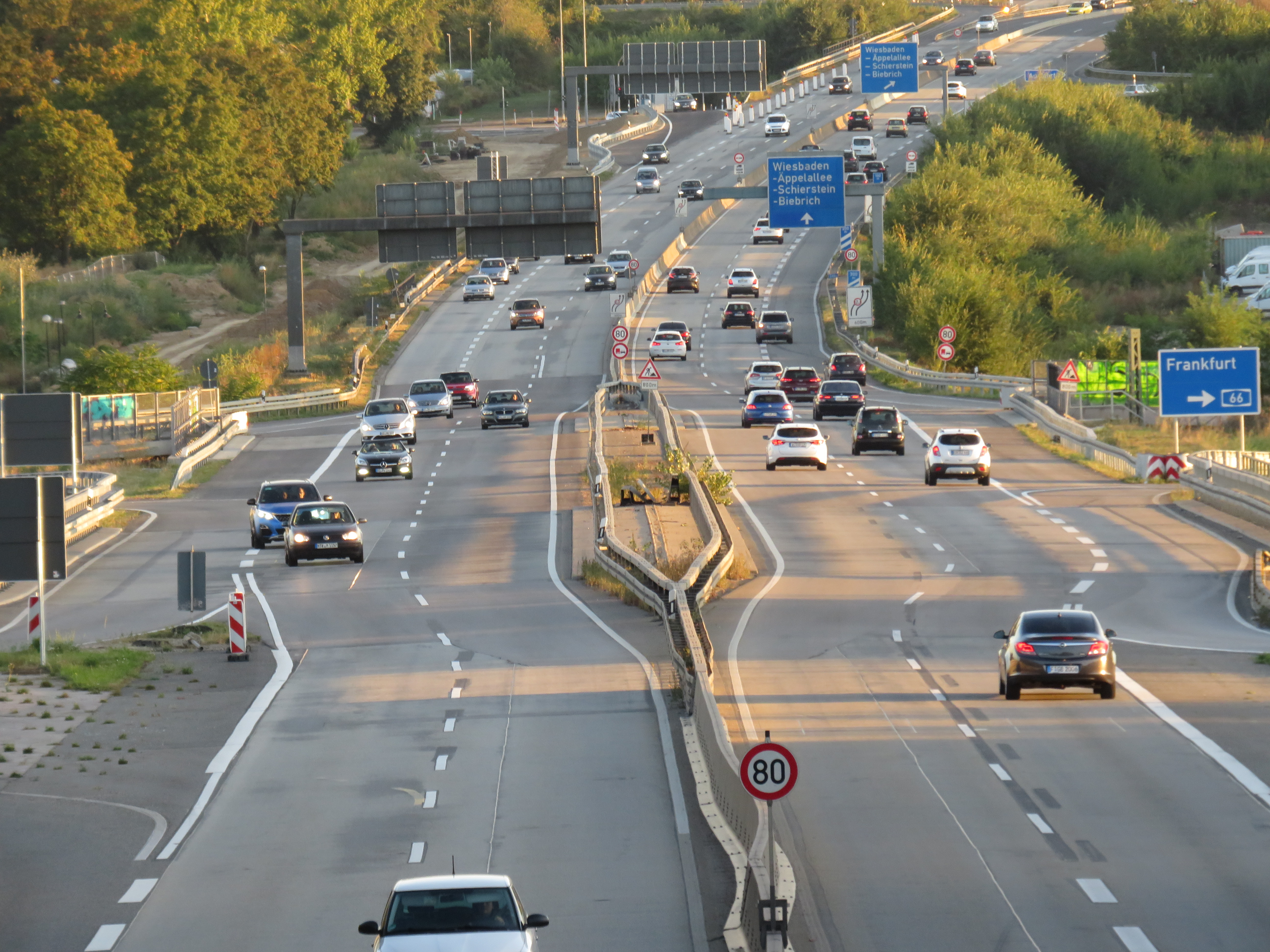 Blick von der Brücke Wörther-See-Straße auf die BAB 643 in südliche Richtung auf das Schiersteiner Kreuz.